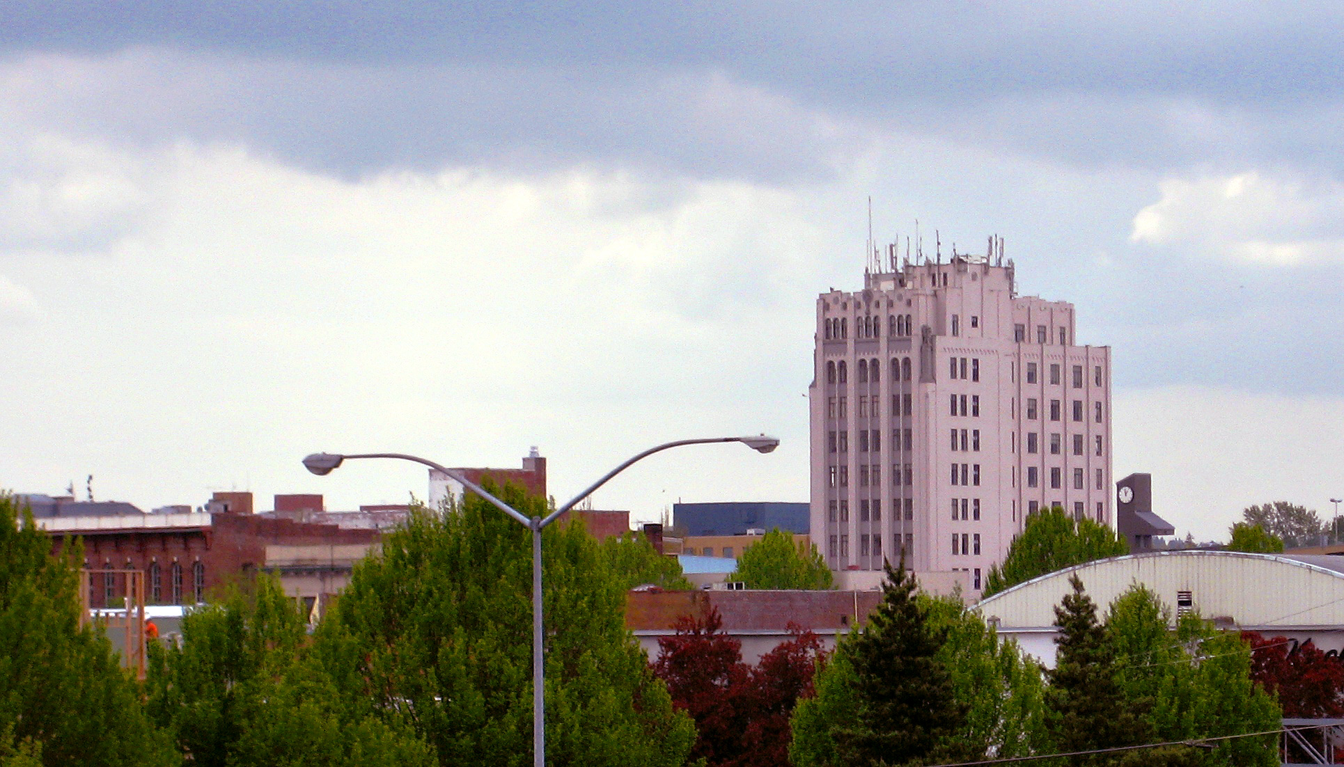 Capitol Center (Oregon)